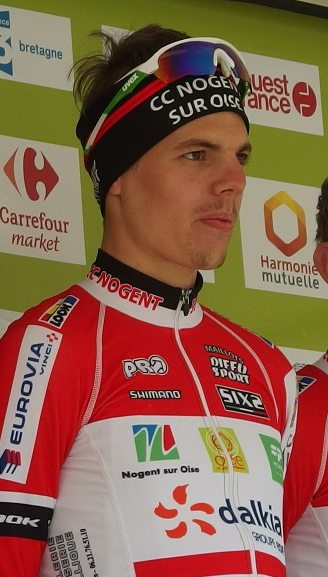 Tour de Bretagne 2015 - Présentation des équipes au départ de la troisième étape à Baud - Équipe CC Nogent-sur-Oise Depicted person: Justin Mottier